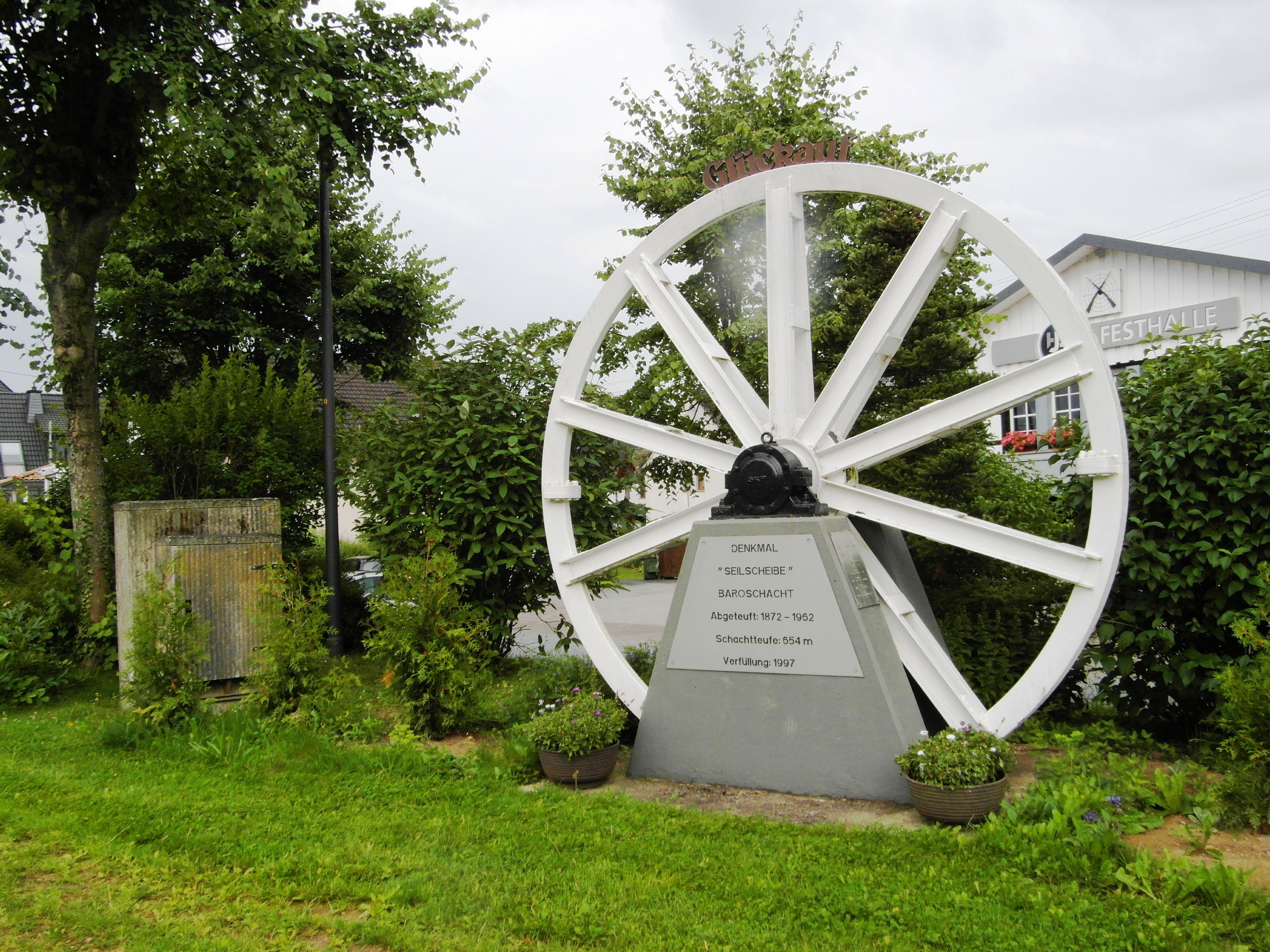 Seilscheibe Baroschacht, Schachttiefe 554m, Verfüllung 1997